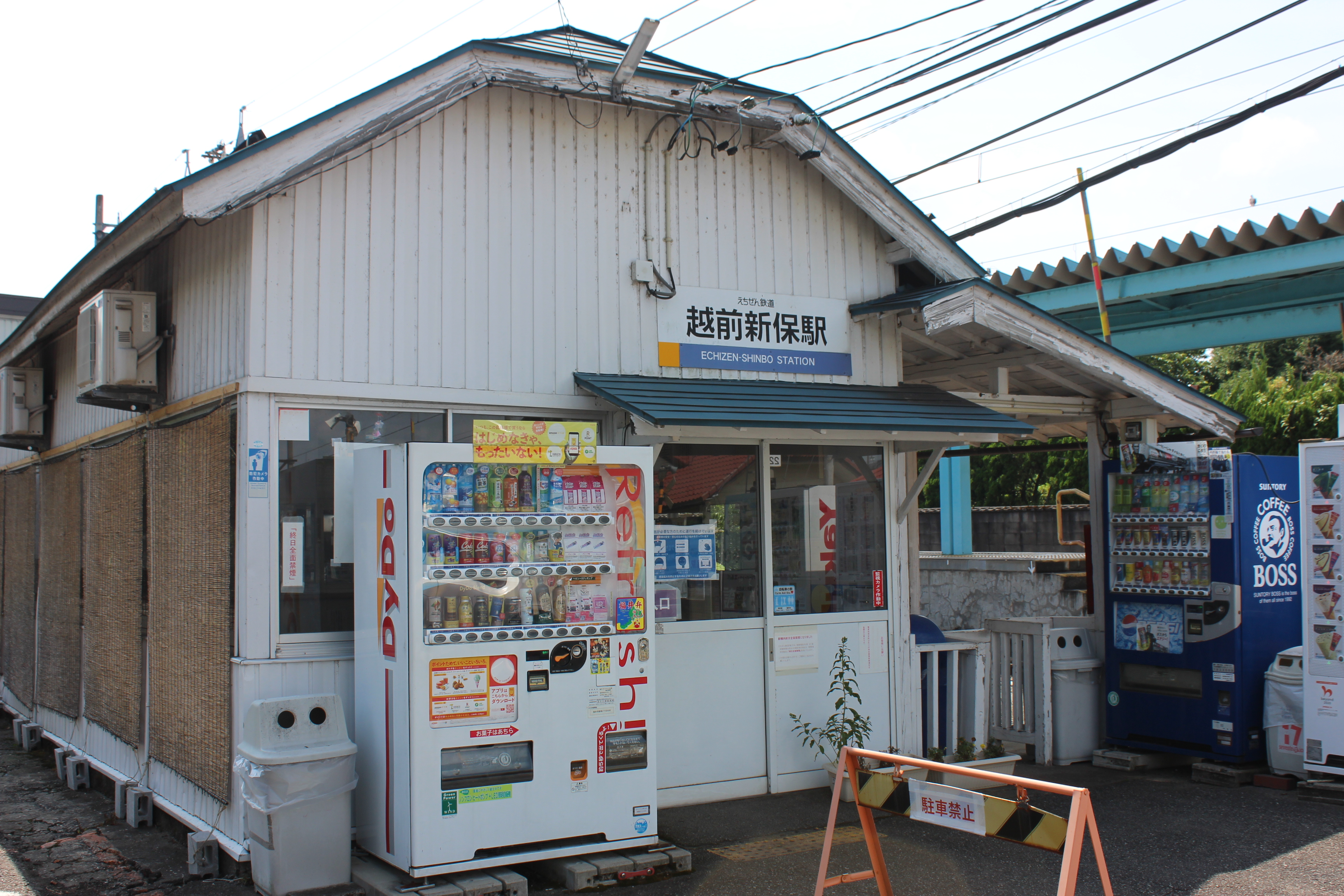 えちぜん鉄道勝山永平寺線越前新保駅